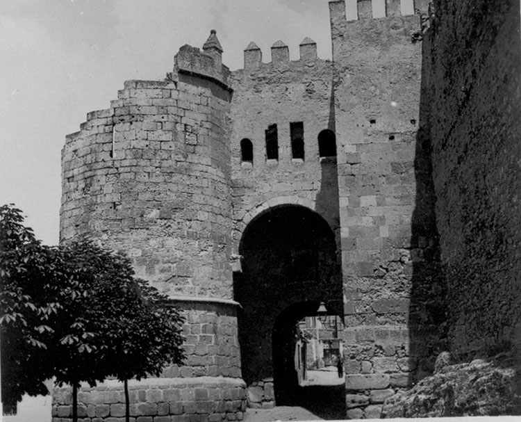 Puerta de San Andrés - Segovia - Fotografía estereoscópica - Fotografía 130 x 60 B/N